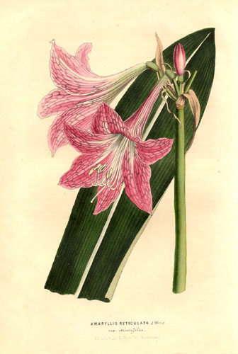 Hippeastrum reticulatum var. striatifolium